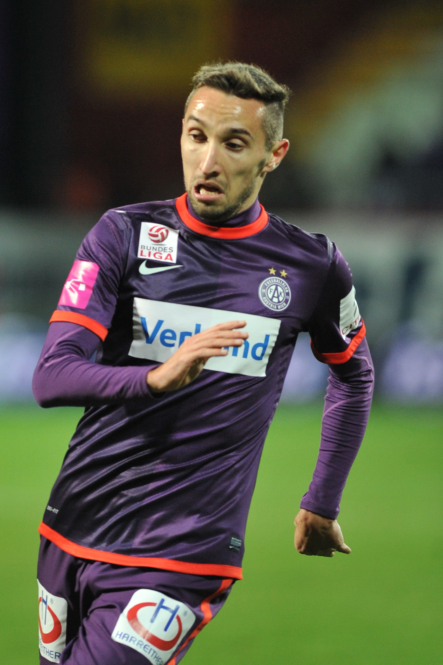 Bundesliga:FK Austria Wien - RZ Pellets WAC Marin Leovac